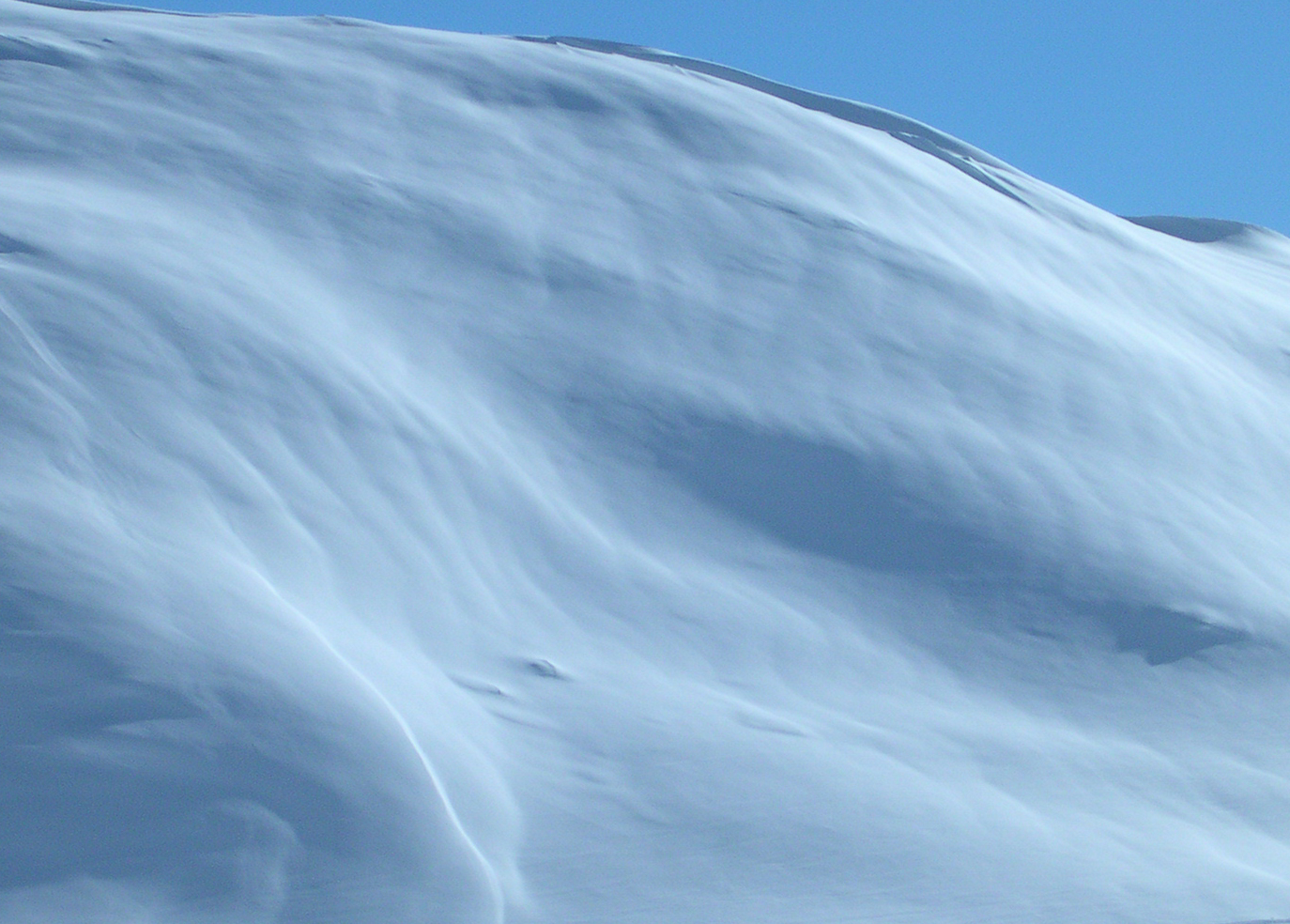 Schneedünen